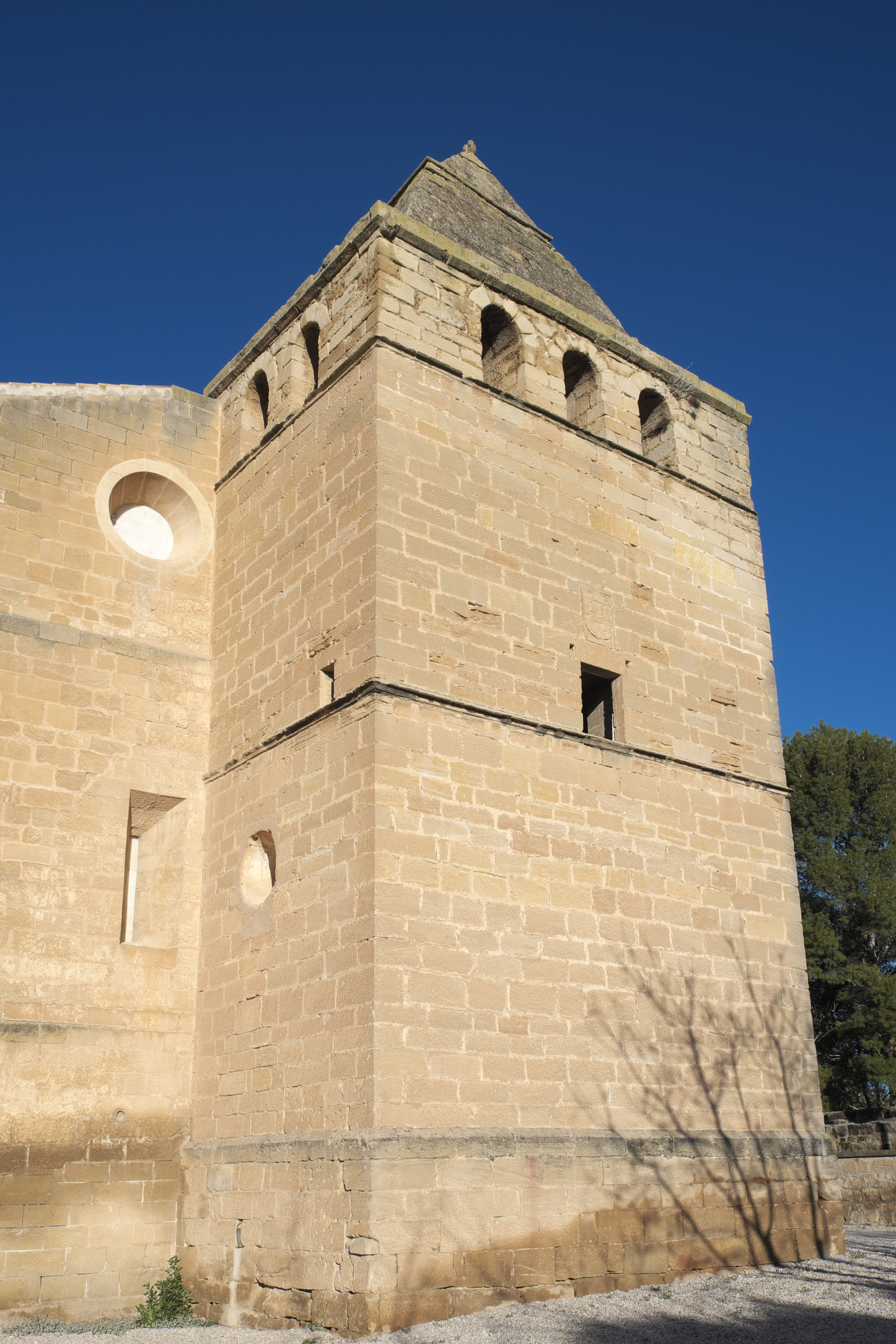 Castillo-Convento von Alcañiz in der Provinz Teruel (Aragonien/Spanien), Torre de Lanuza